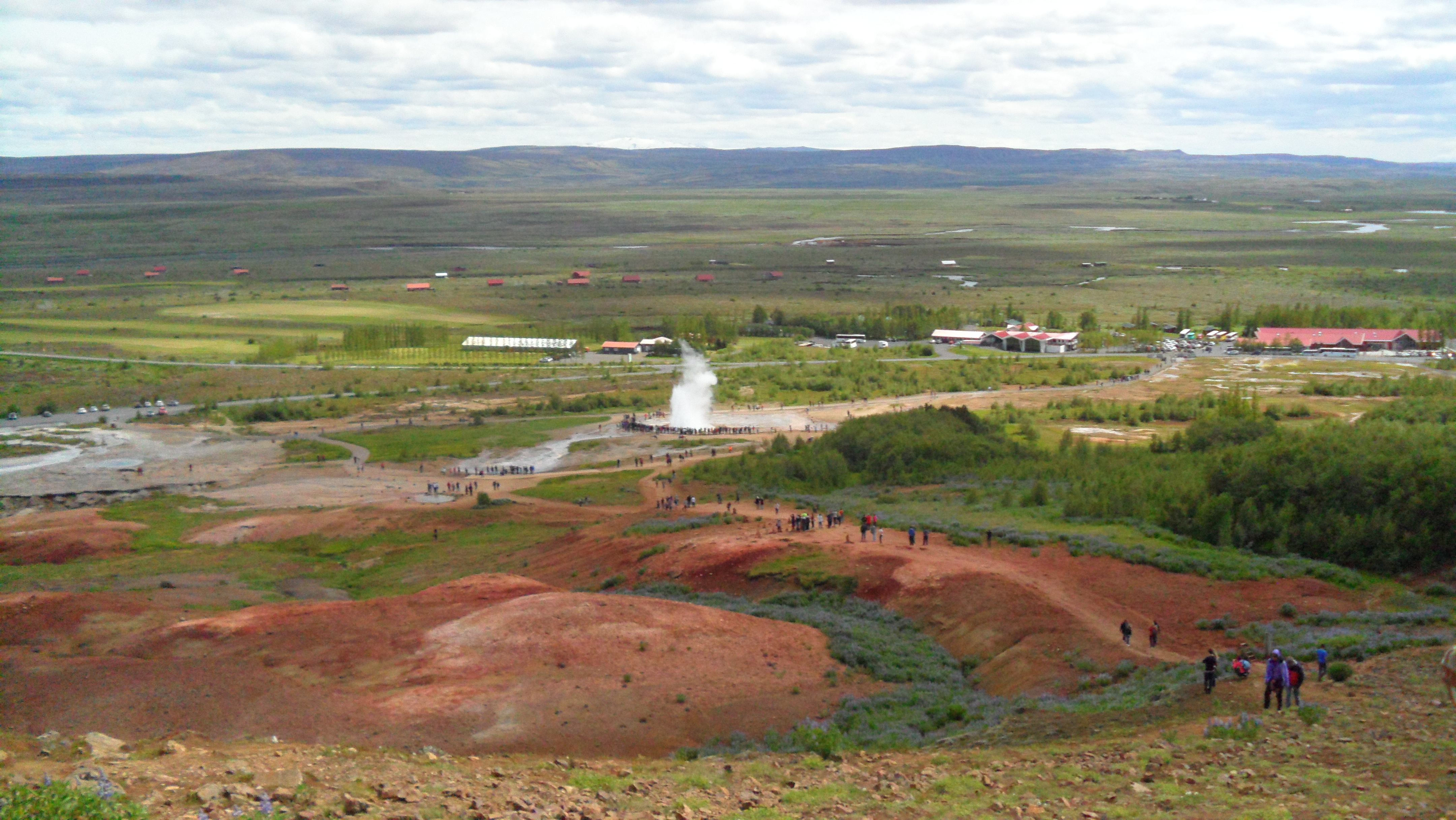 Geotermalno polje z gejziri okoli Haukadalurja, Islandija.